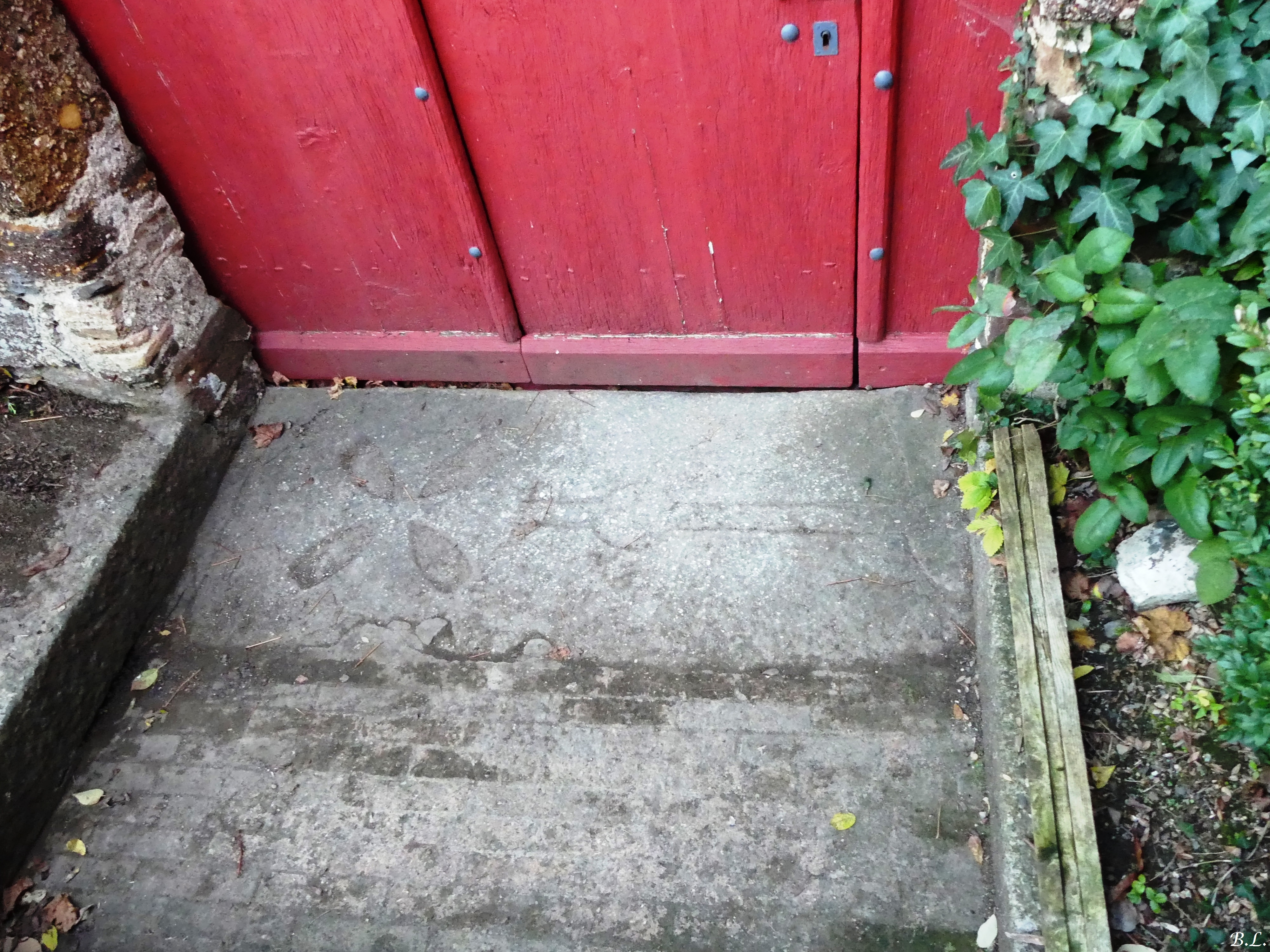 Dalle mérovingienne